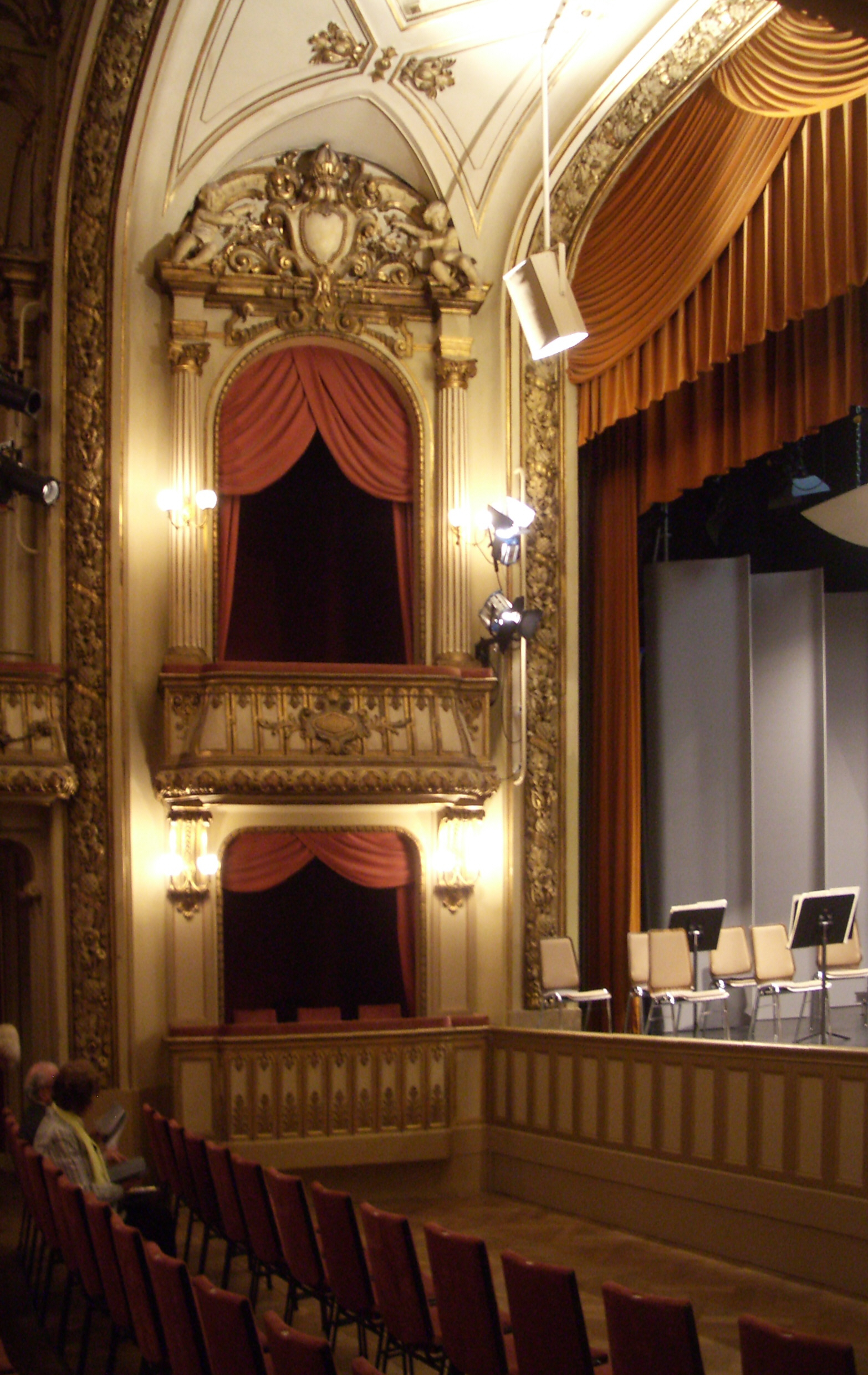 Konzerthaus Ravensburg, Proszeniumslogen links